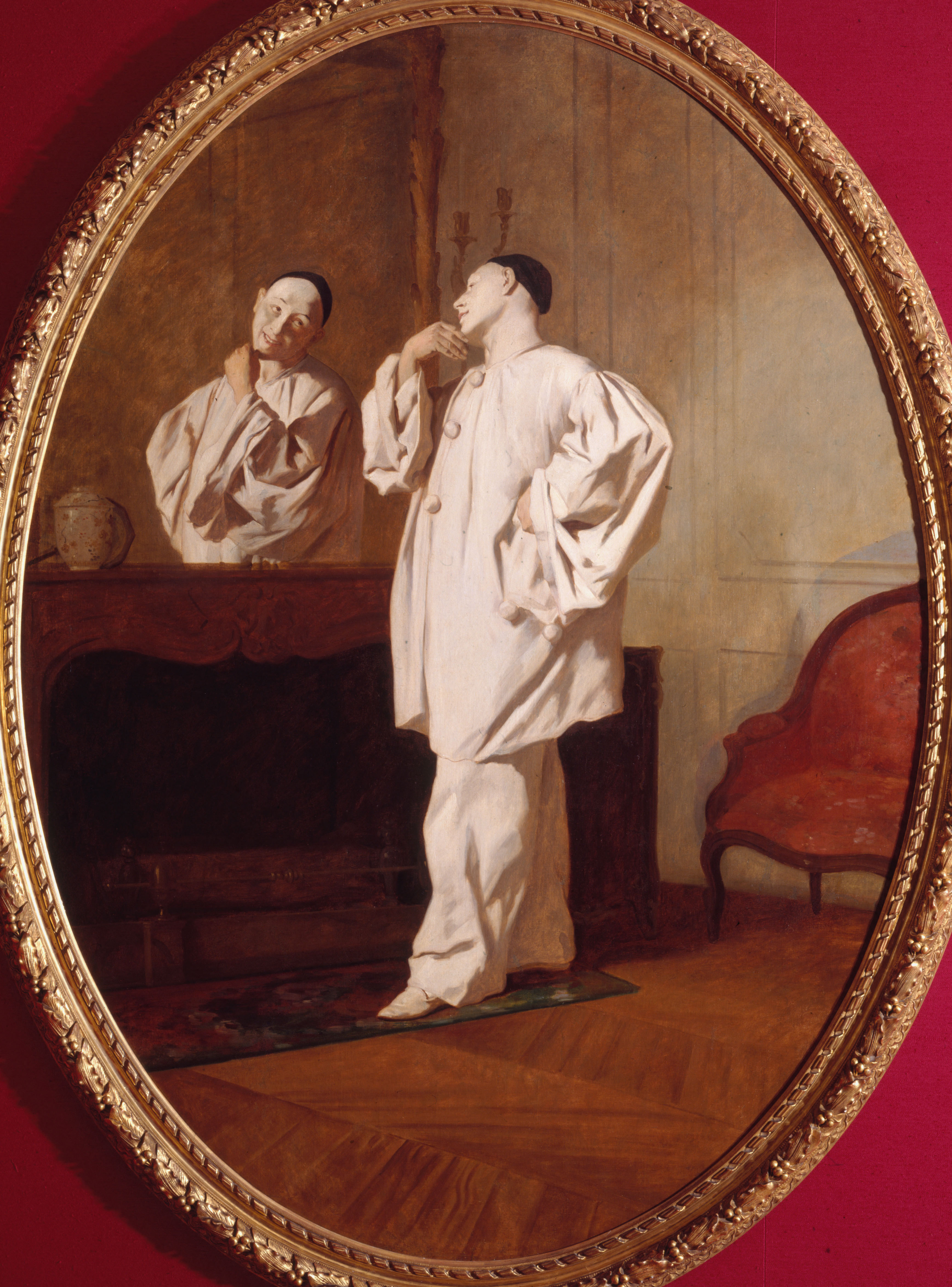 Jean Pezous (1815-1885), Portrait du mime Debureau, Paris, musée Carnavalet.